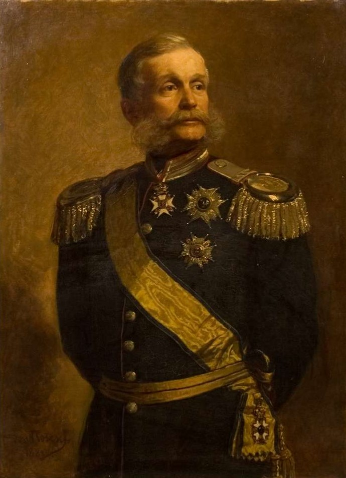 Portrait of Sven Lagerberg